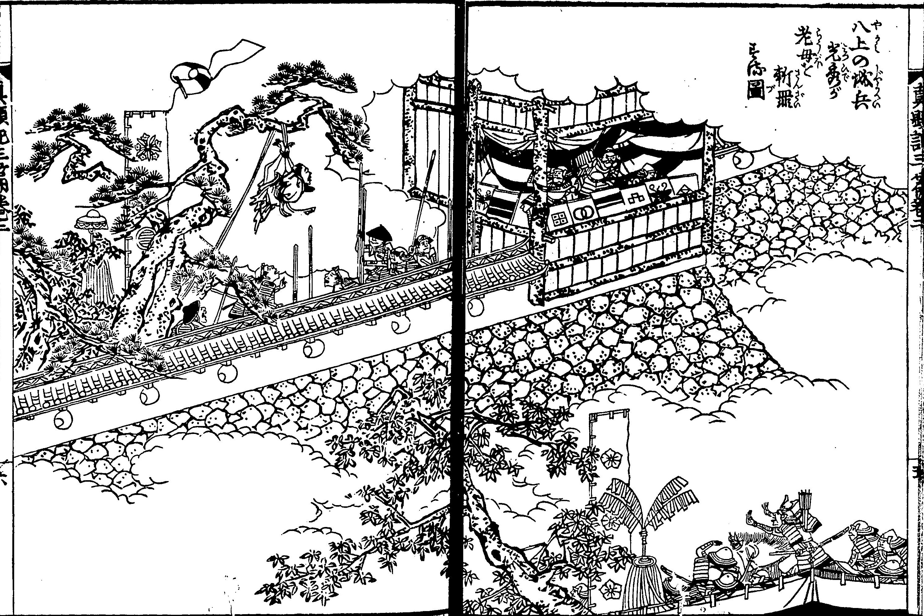 『絵本太閤記』の一場面。（絵：岡田玉山） 「八上の城兵、光秀の老母を斬罪にする図」